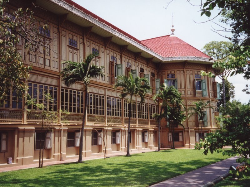 Vimanmek Palace